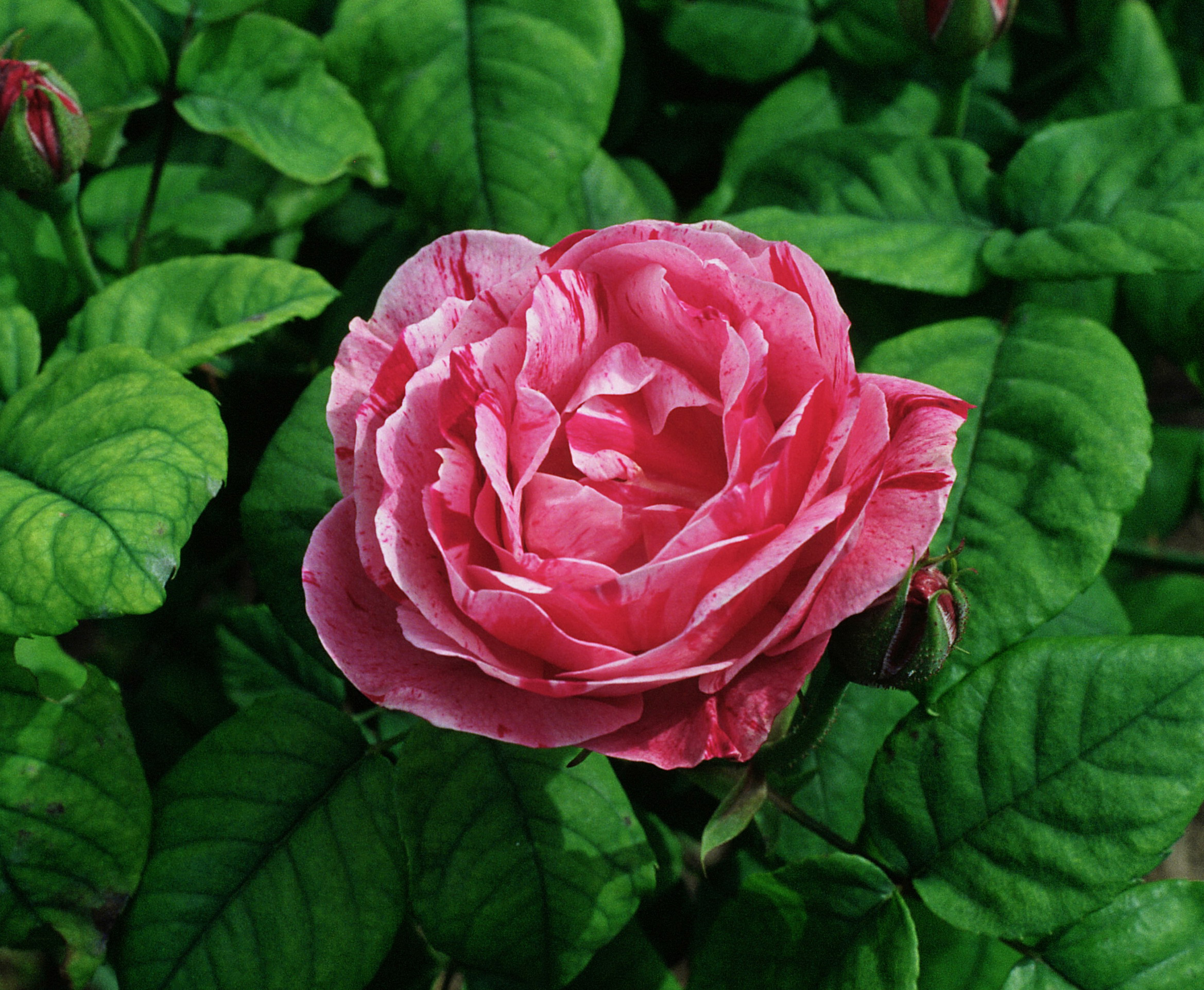 Rosa 'Ferdinand Pichard', Híbridos reflorecientes, sect. Rosa. Real Jardín Botánico, Madrid